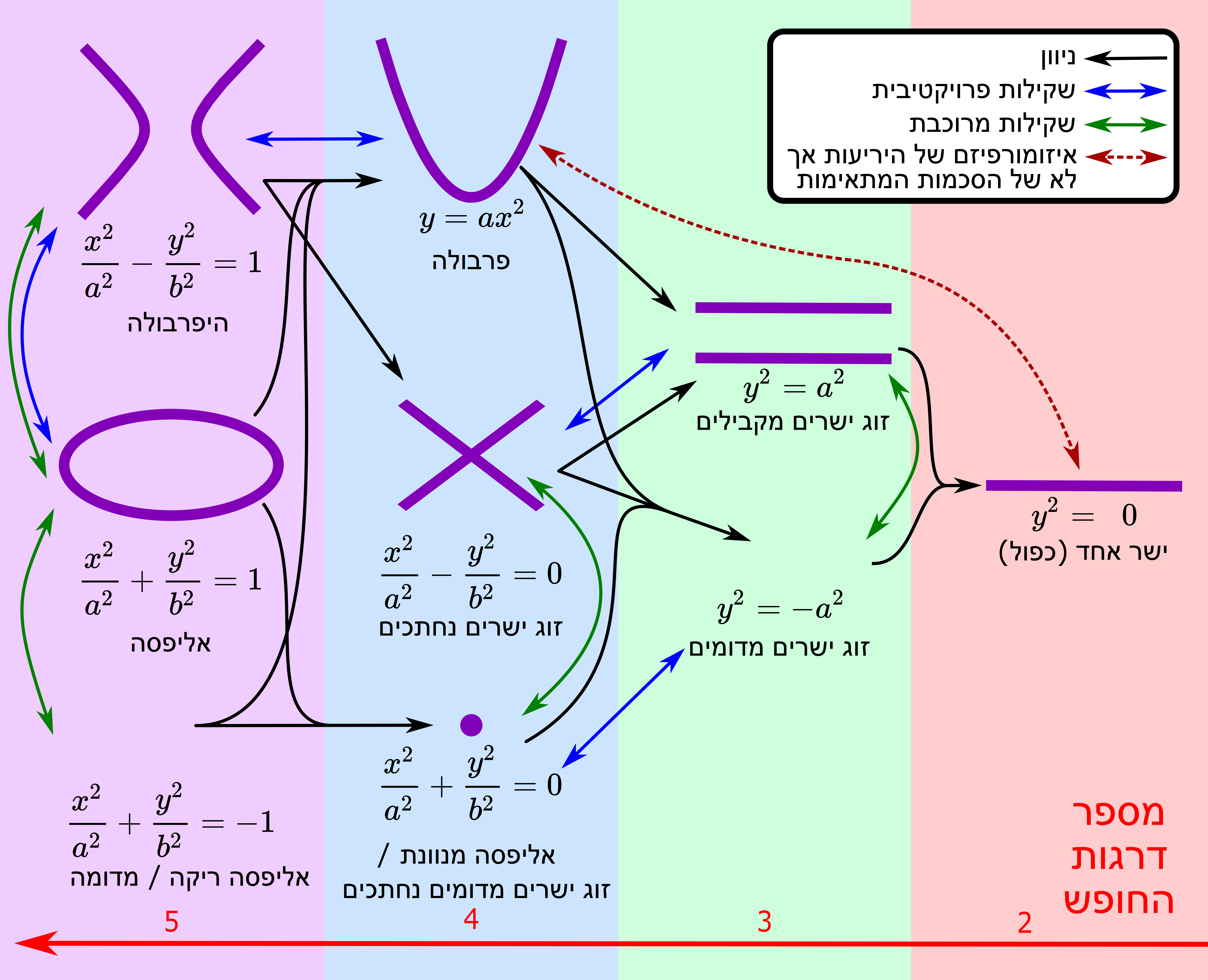 עקומים ריבועיים מישוריים והקשרים בינהם ראה גם גרסה וקטורית: File:Quadratic planar curves.svg